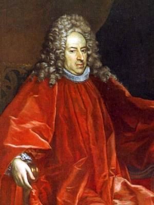 Ritratto del doge Domenico Maria De Mari